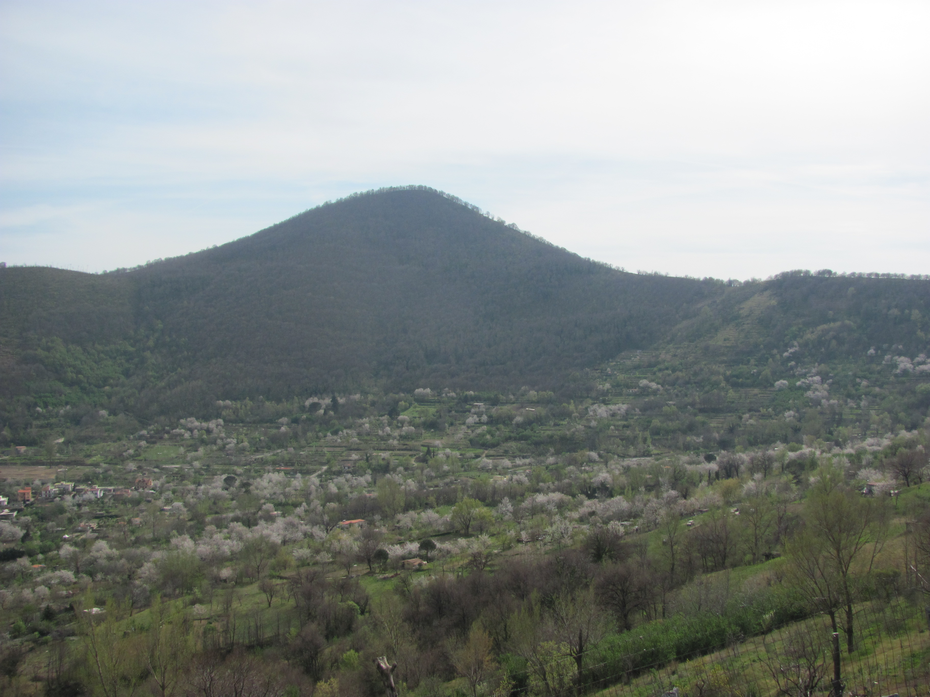 Siano (SA), Italia, Vista Bosco Borbone, Ciliegi in fiore